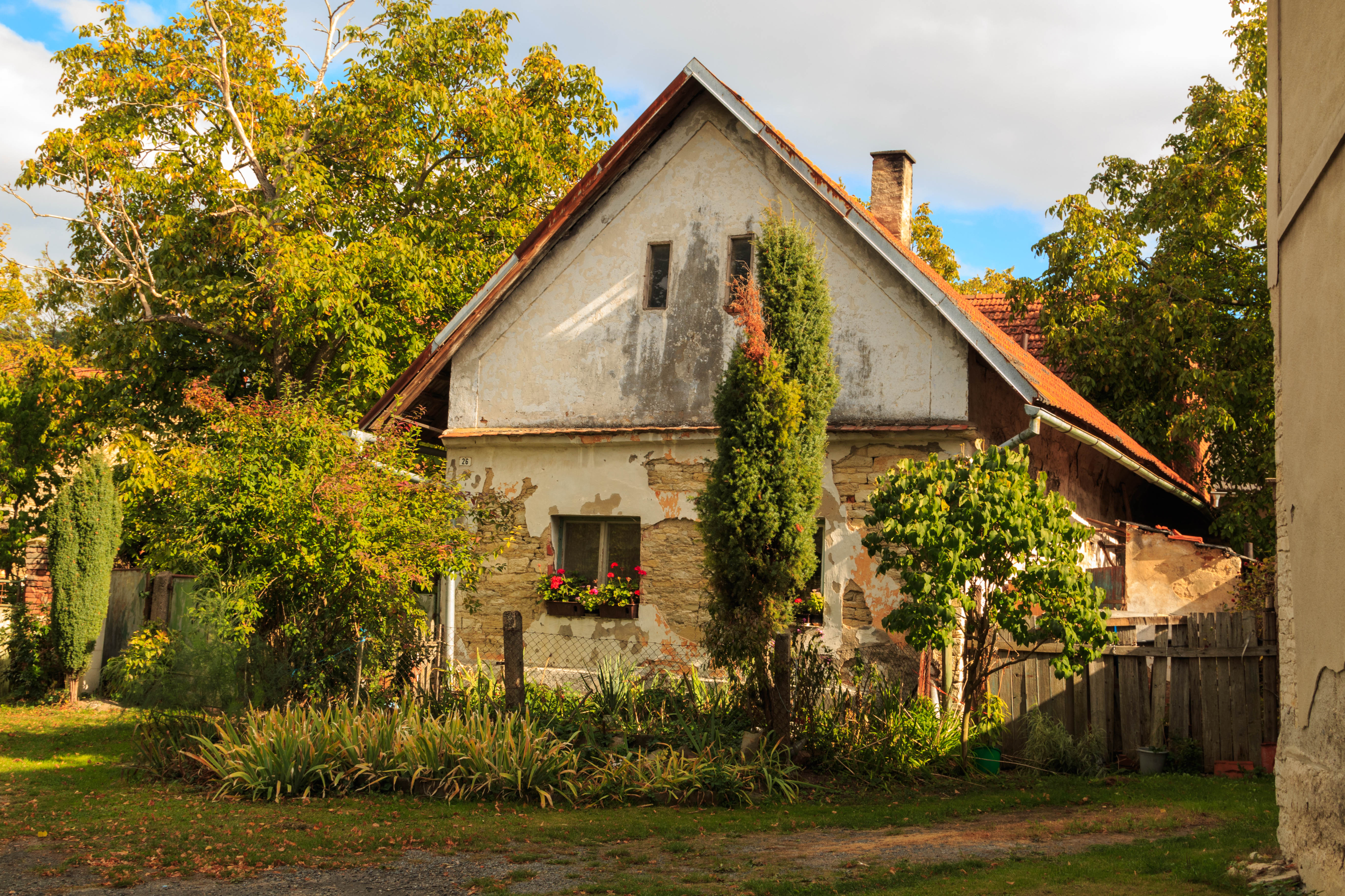 Štenec čp. 26